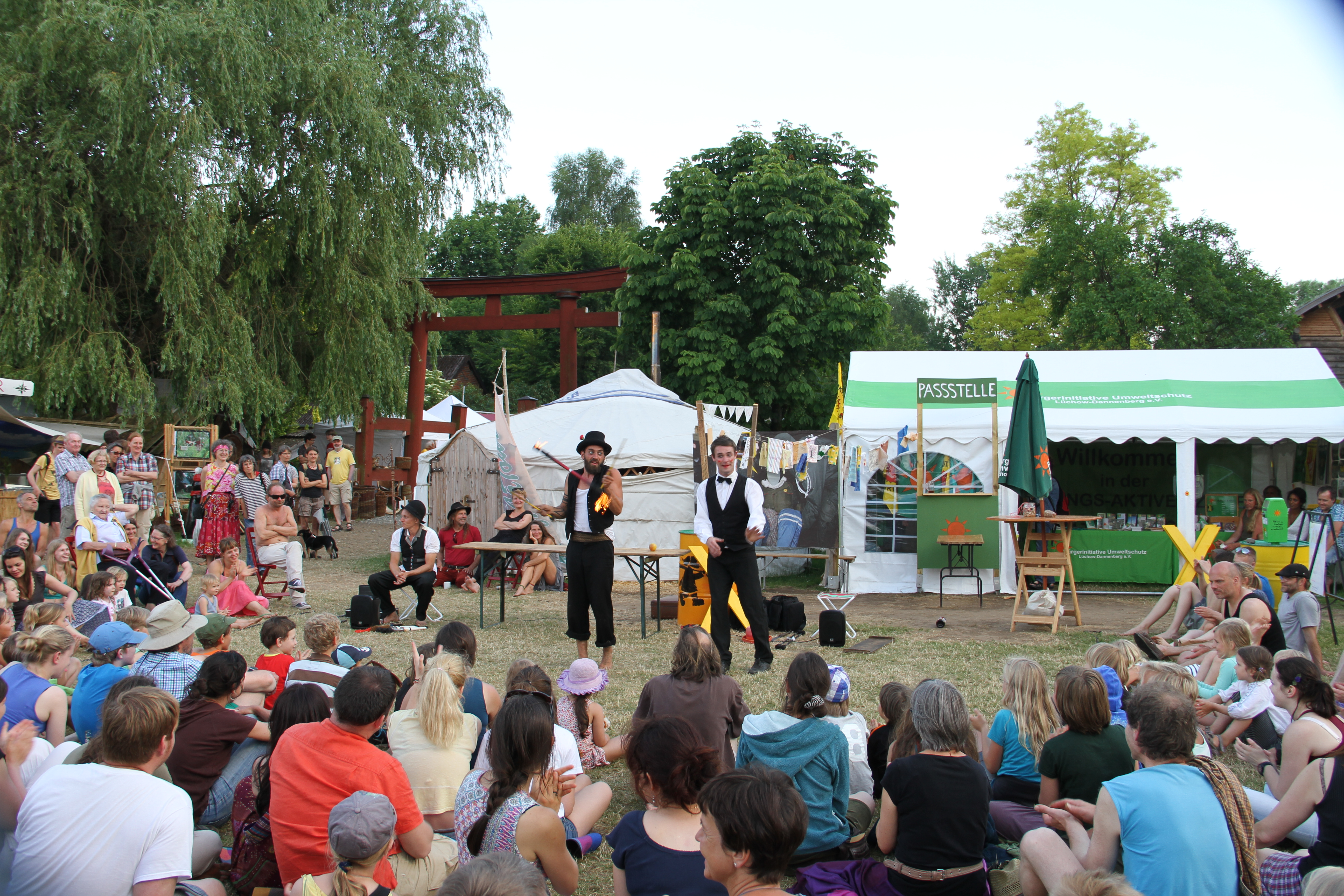 Mützingen, Münzingenta 2014